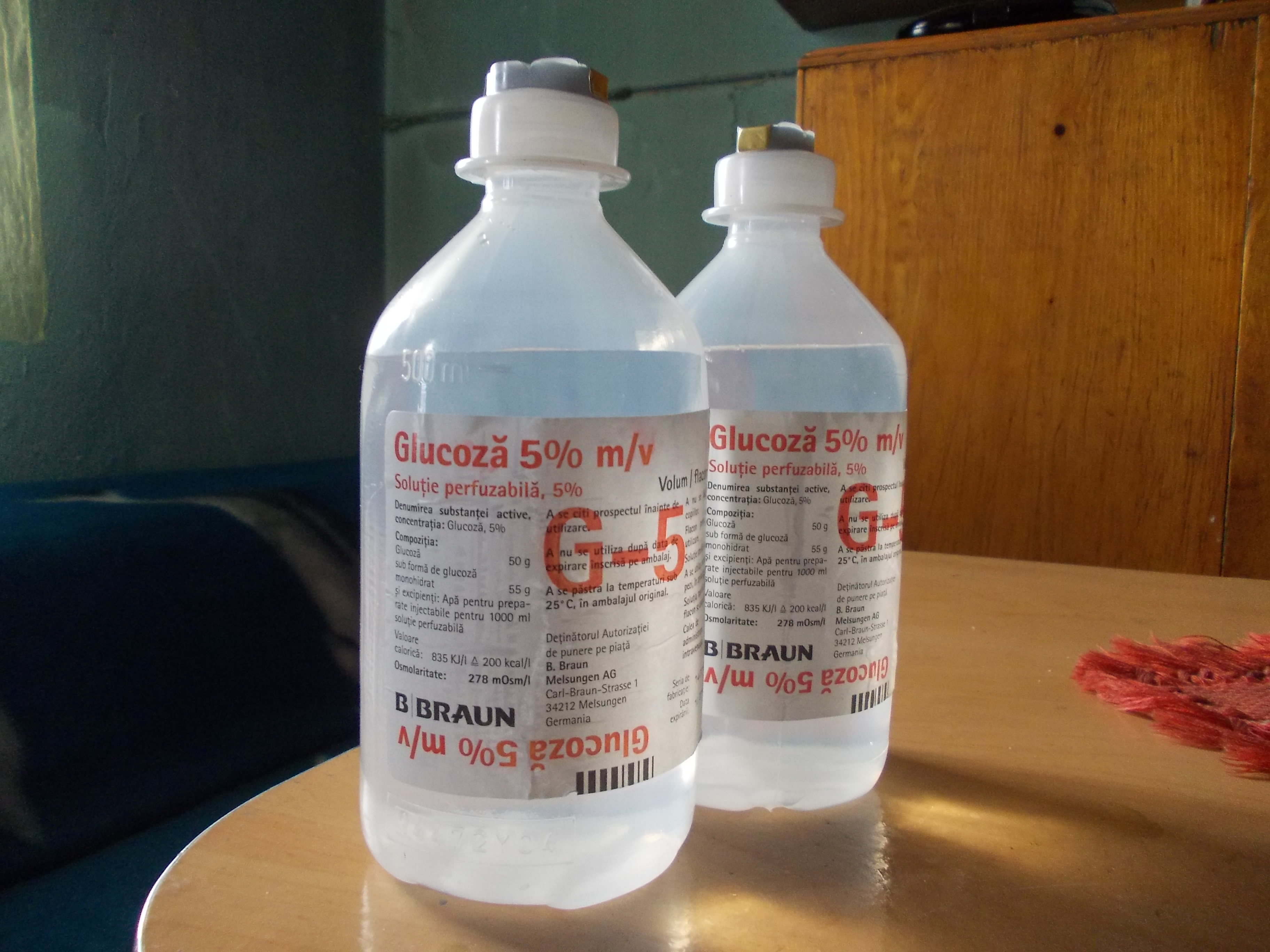 Flacoane cu soluţie de glucoză 5 %, ptr uz medicinal